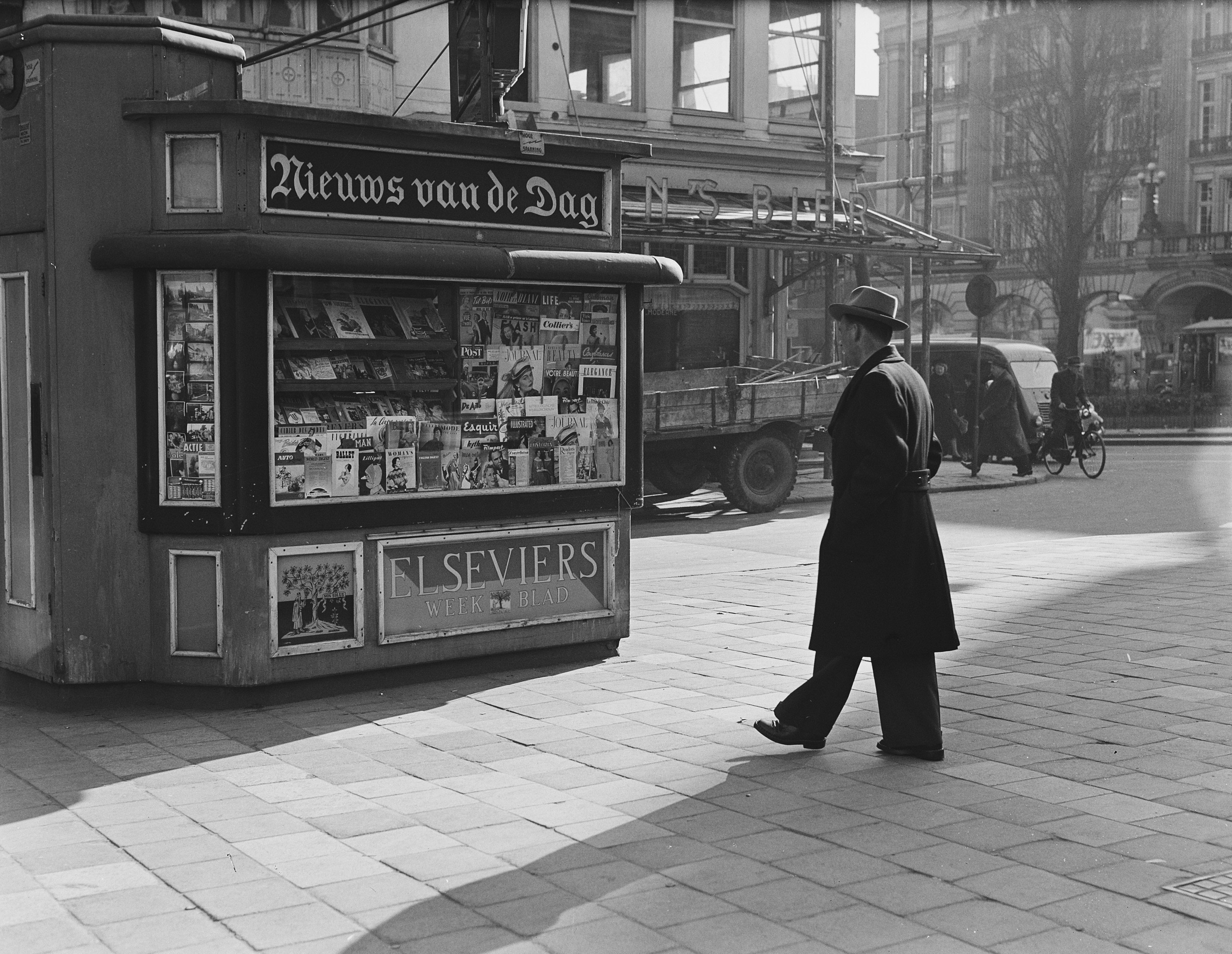 Collectie / Archief : Fotocollectie Anefo Reportage / Serie : [ onbekend ] Beschrijving : Krantenkiosk te Amsterdam, Leidseplein met reclame voor Nieuws van de Dag en Elseviers Weekblad Datum : 5 maart 1951 Locatie : Amsterdam Trefwoorden : kiosken, kranten, tijdschriften Persoonsnaam : Elsevier, Kemperman Fotograaf : Oorschot, […] van / Anefo Auteursrechthebbende : Nationaal Archief Materiaalsoort : Glasnegatief Nummer archiefinventaris : bekijk toegang 2.24.01.09 Bestanddeelnummer : 904-4564